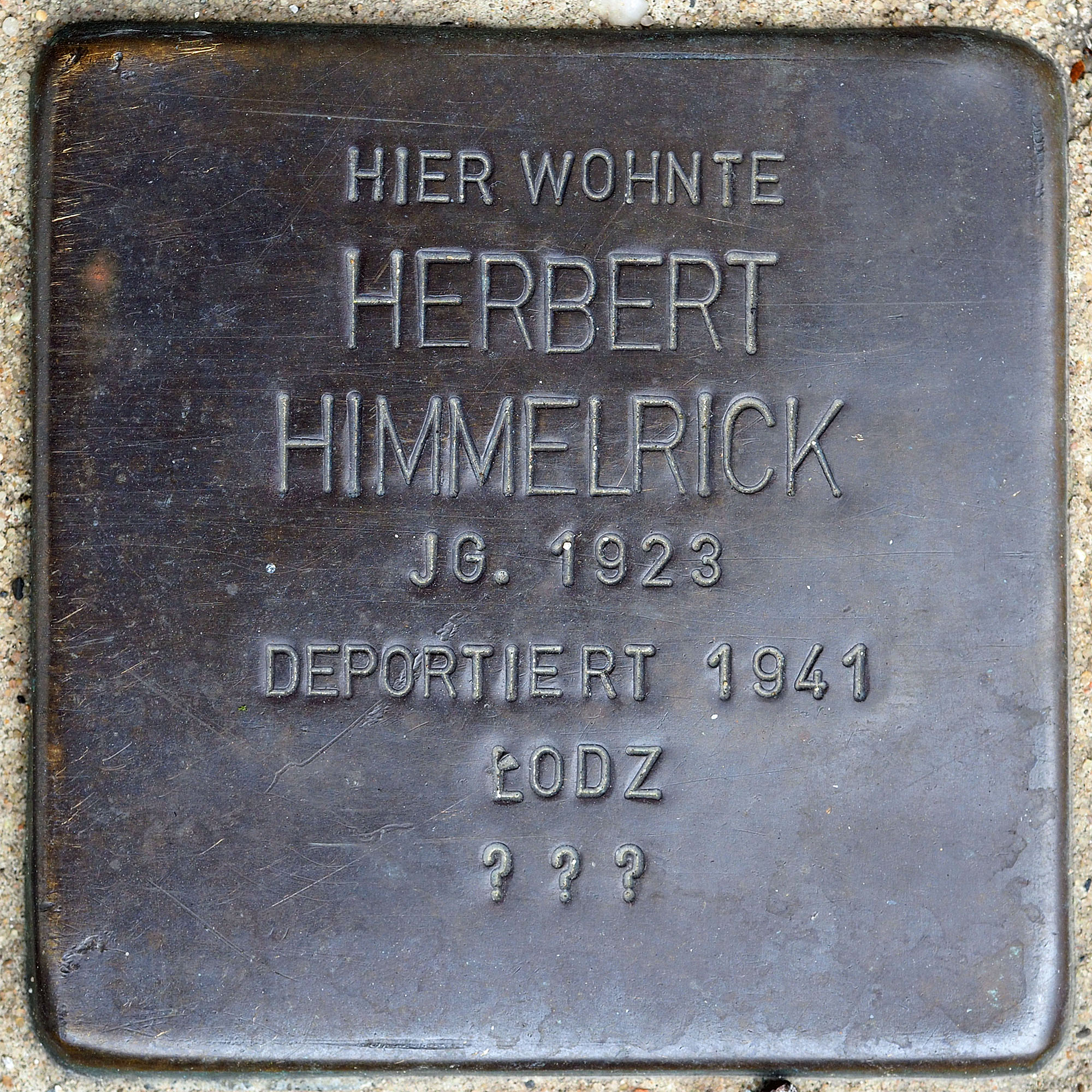 Stolpersteine MG: Himmelrick, Herbert